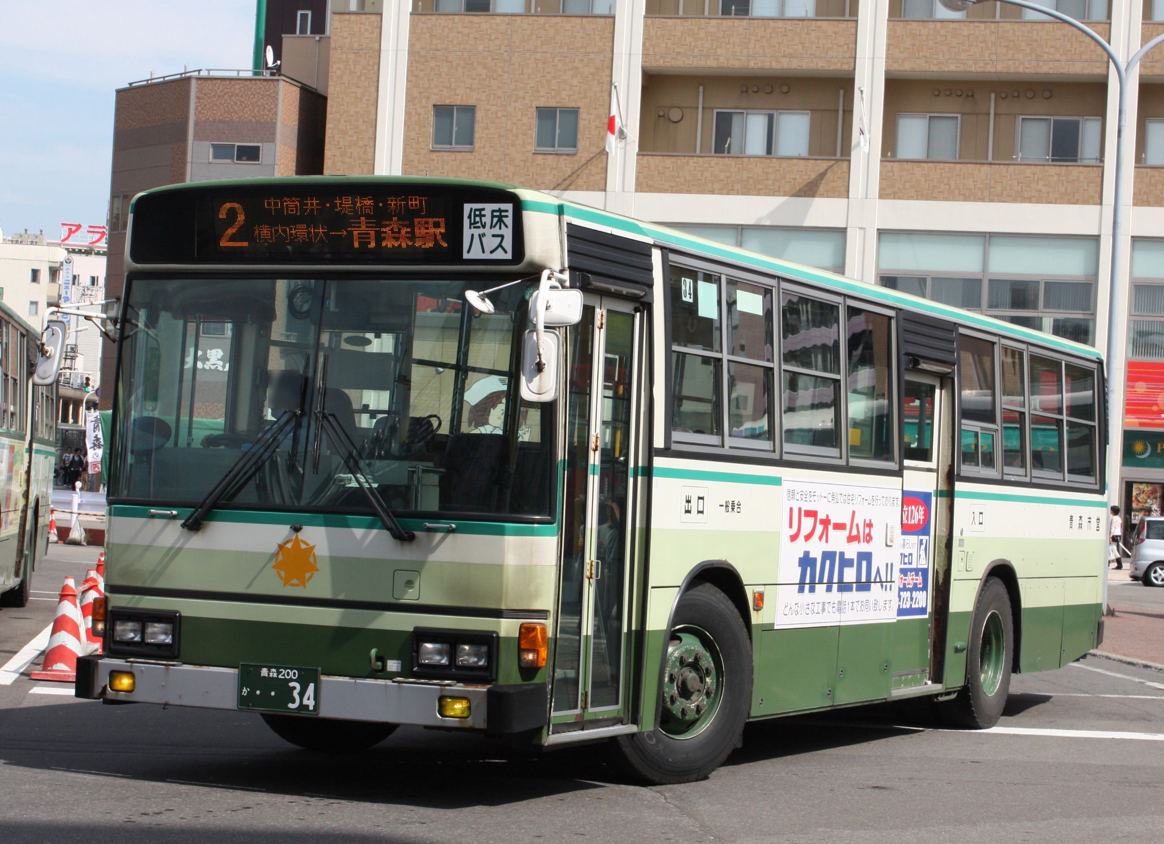 青森市営バス 青森市営バス 青森200か34 青森駅にて